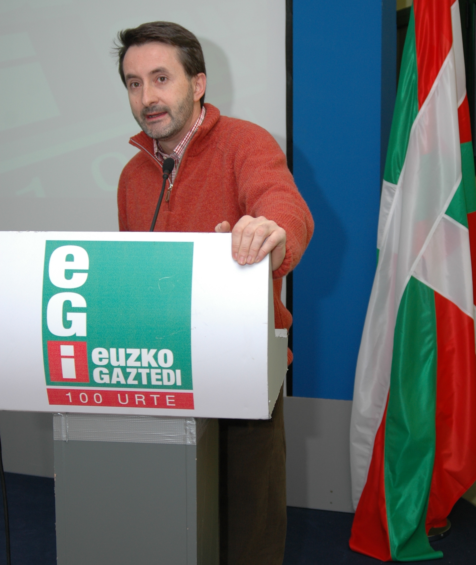 Josu Jon Imaz en un acto de la organización juvenil del partido (EGI)